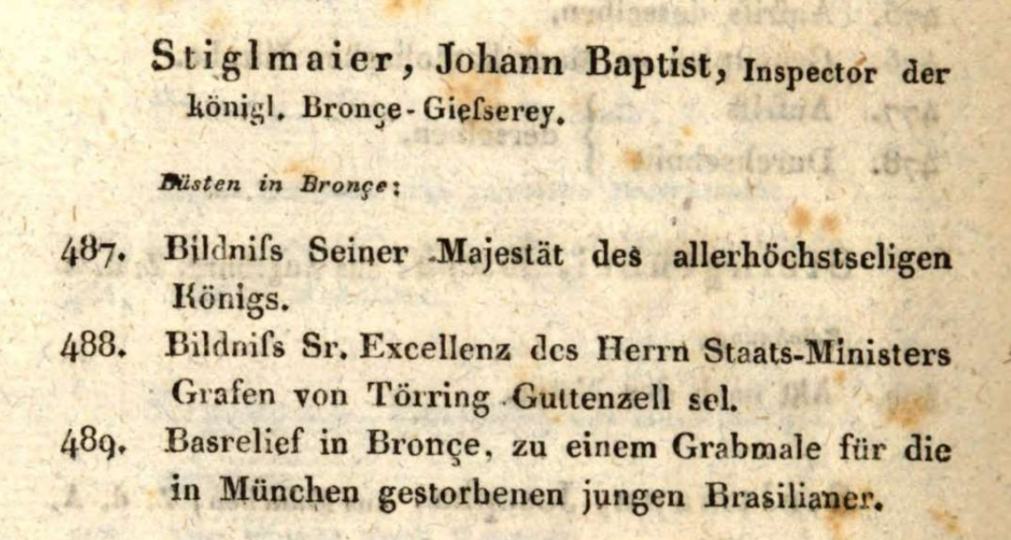 Katalog der Kunstausstellung der Königlich-Bayerischen Akademie der bildenden Künste am 12ten Oktober 1826, München (E. A. Fleischmann) o. J. (1826), S. 40 (Ausschnitt)